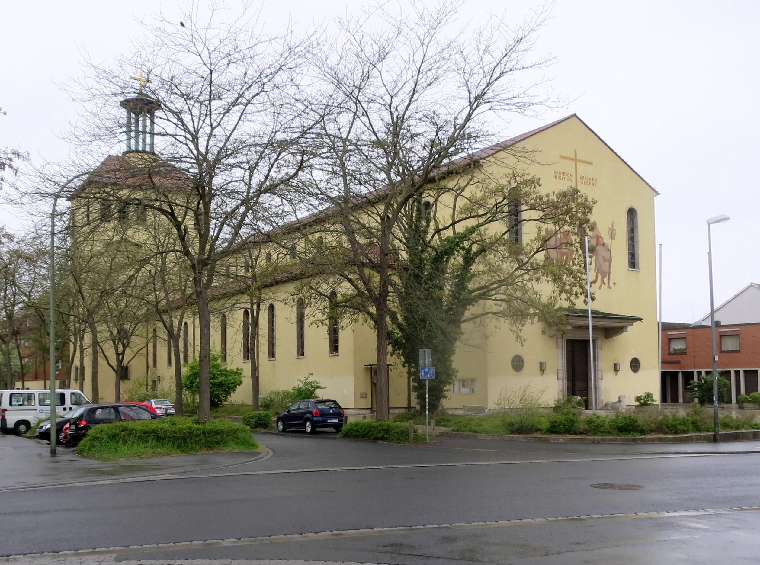 Würzburg - Friedrichstraße 26 - Heilig-Kreuz-Kirche. Katholische Pfarrkirche